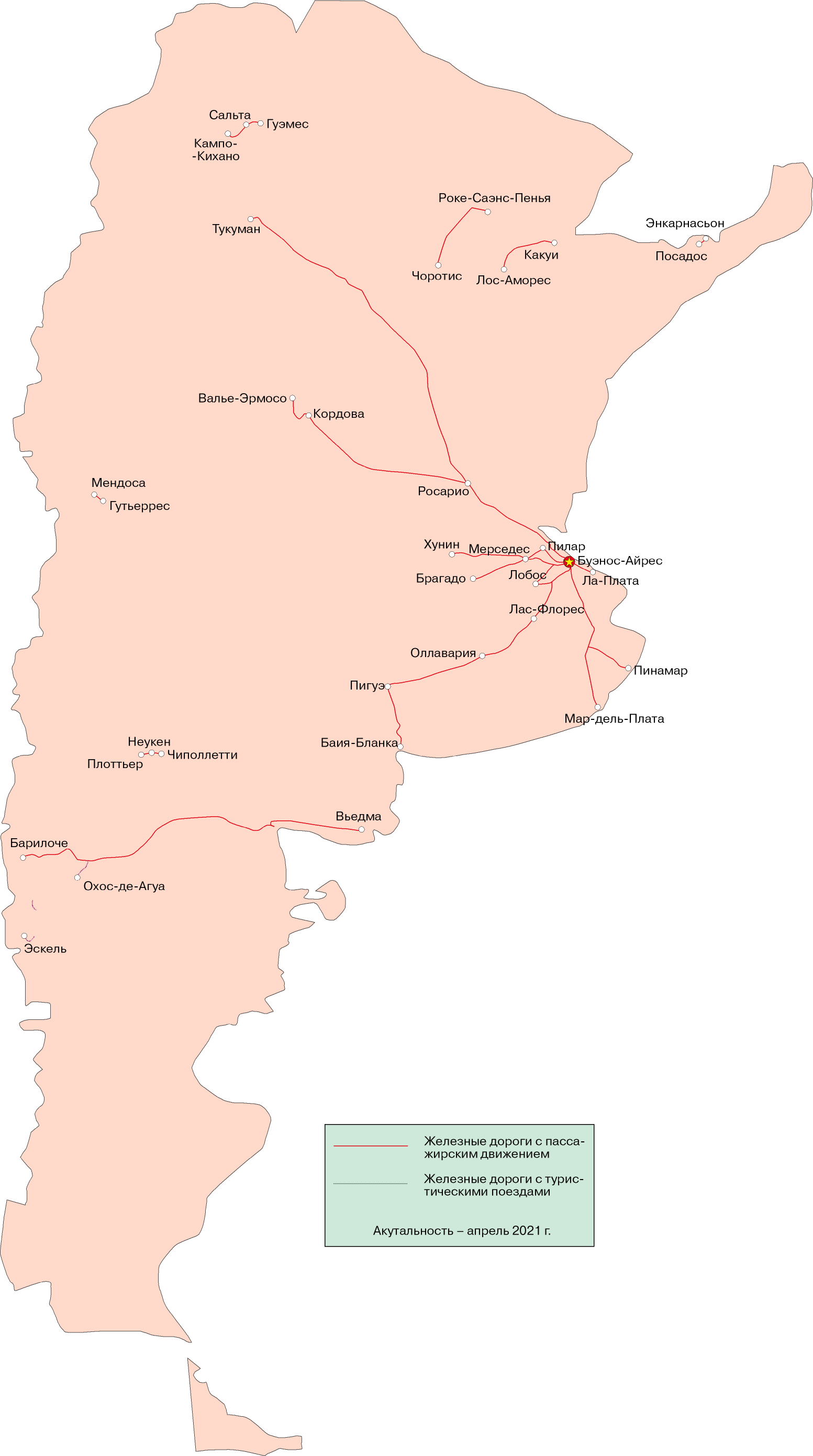 Сеть пассажирских железных дорог Аргентины (окт. 2012)